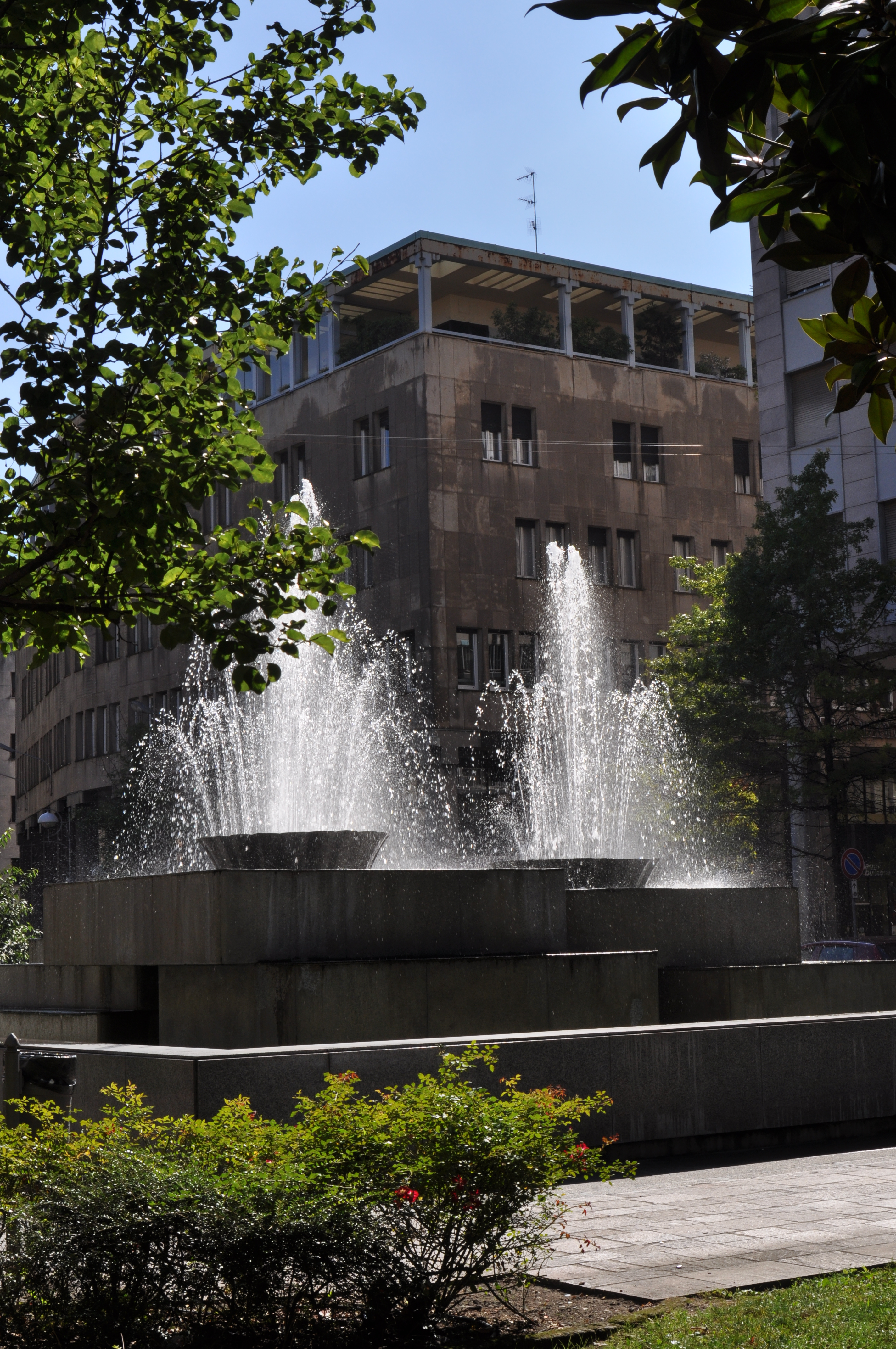 Fontana di piazza Garibaldi This is a photo of a monument which is part of cultural heritage of Italy.